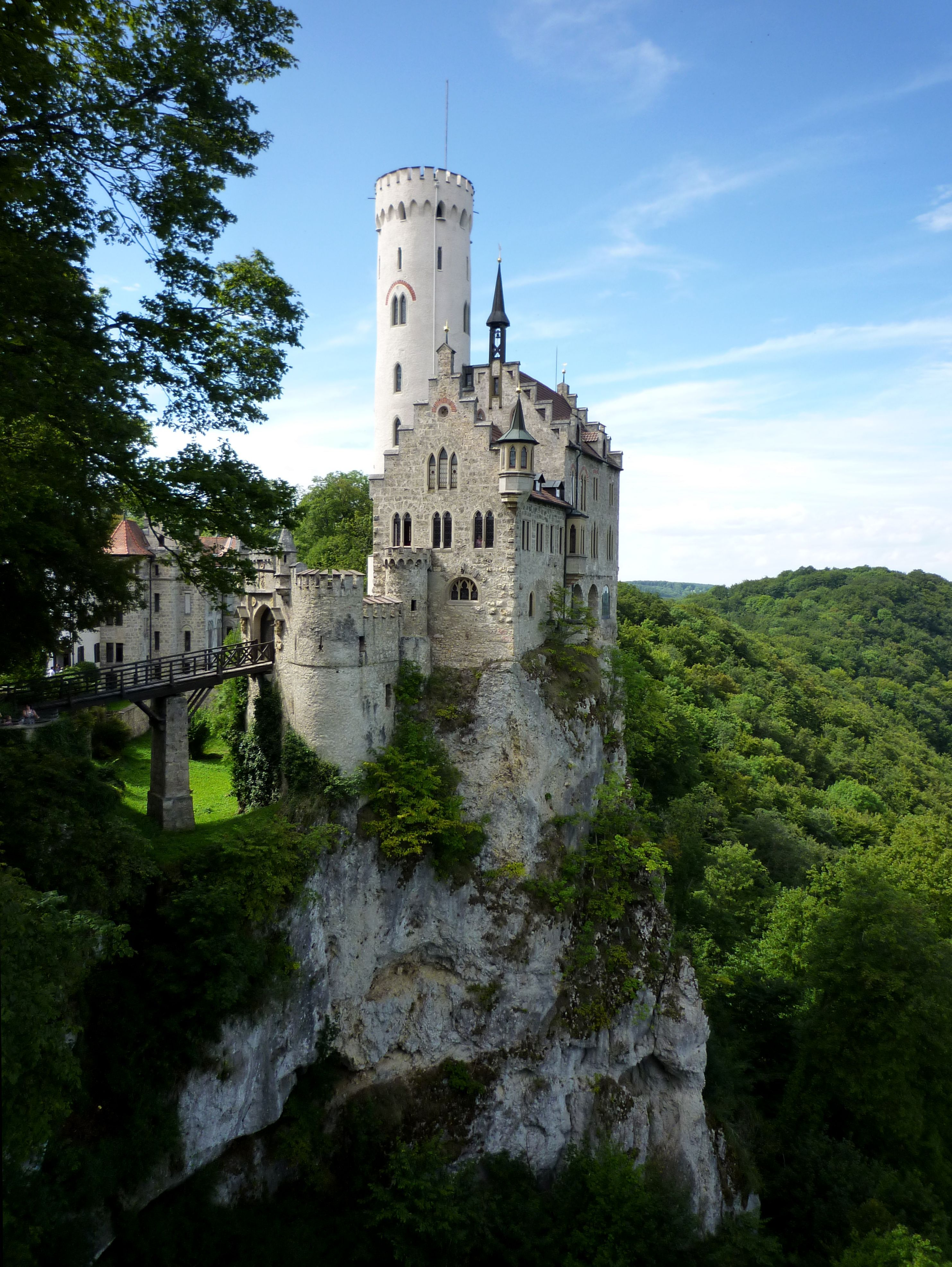 Lichtenstein - Schloss 817 m ü.NN.jpg